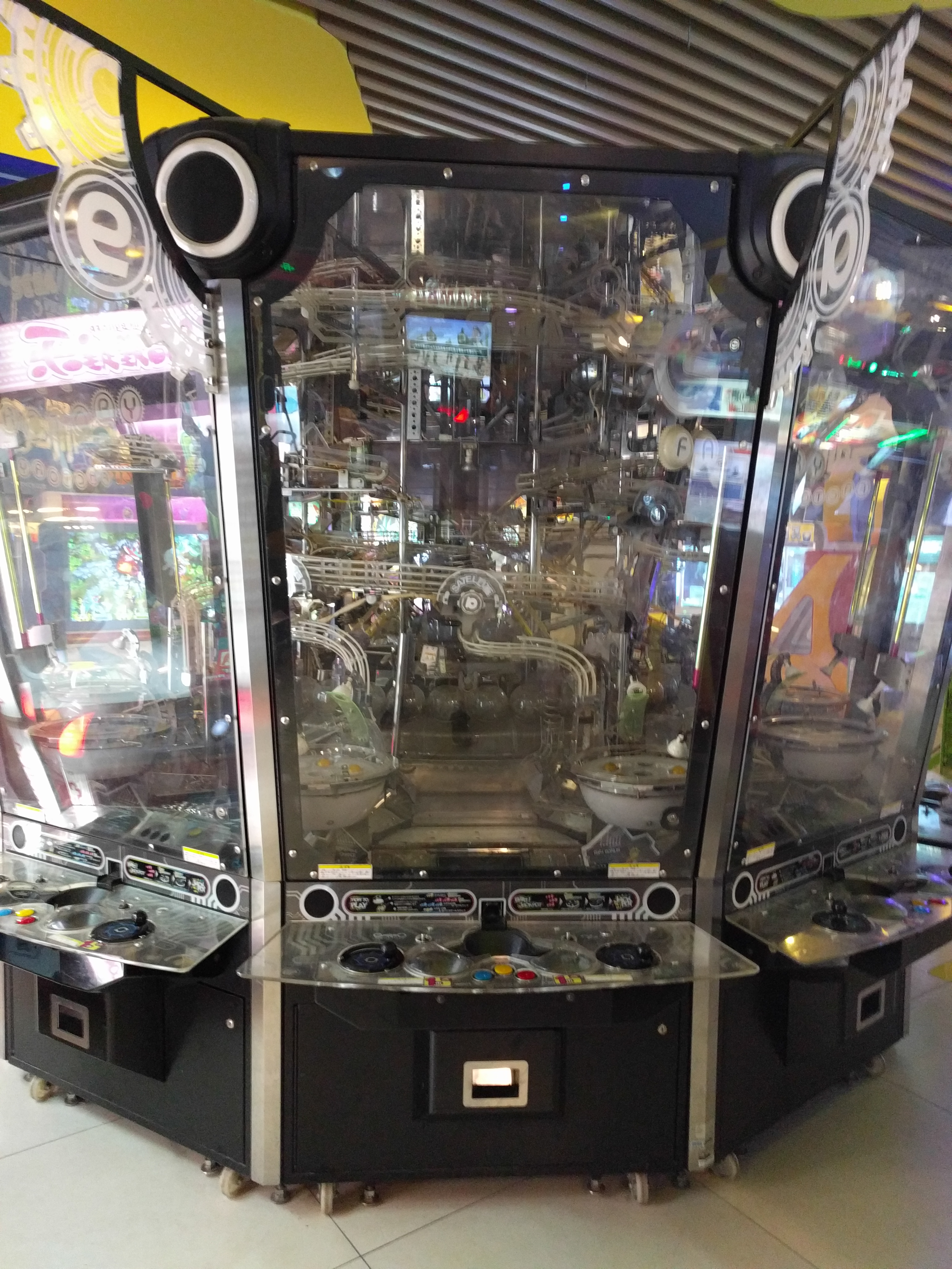 伽利略工廠